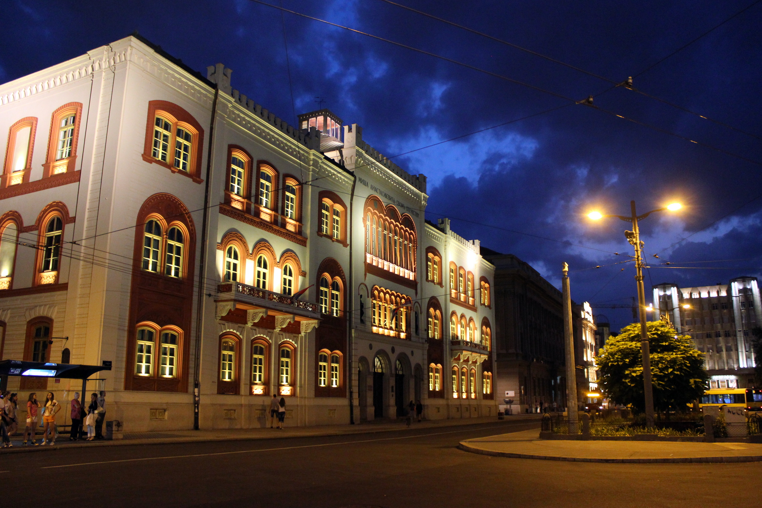 Der Kolarac ist der Sitz des Rektorats und das Hauptgebäude der Universität Belgrad.